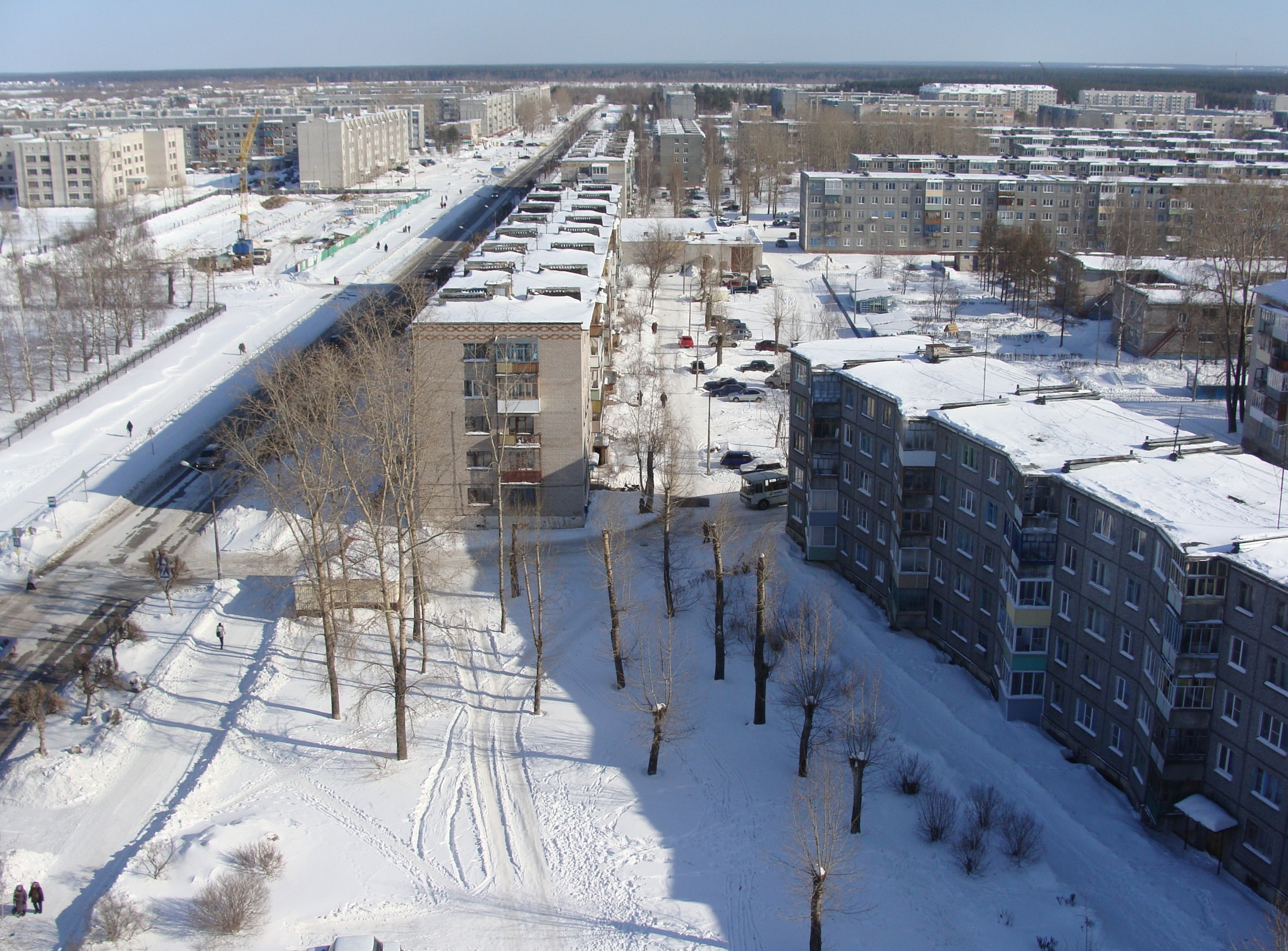 Проспект им. Ленина г.Коряжма